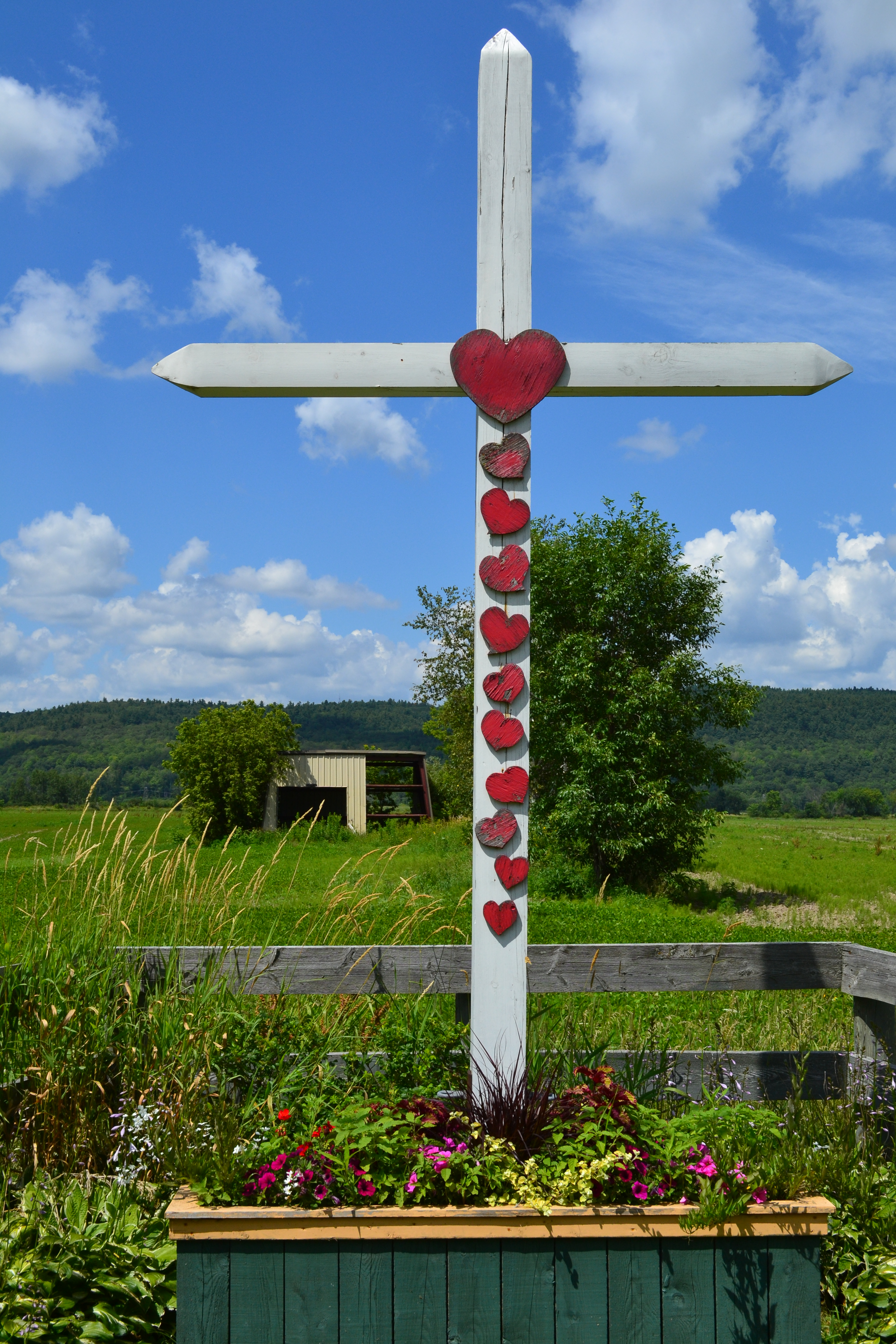 Face avant d'une croix de chemin à Fassett au Québec.